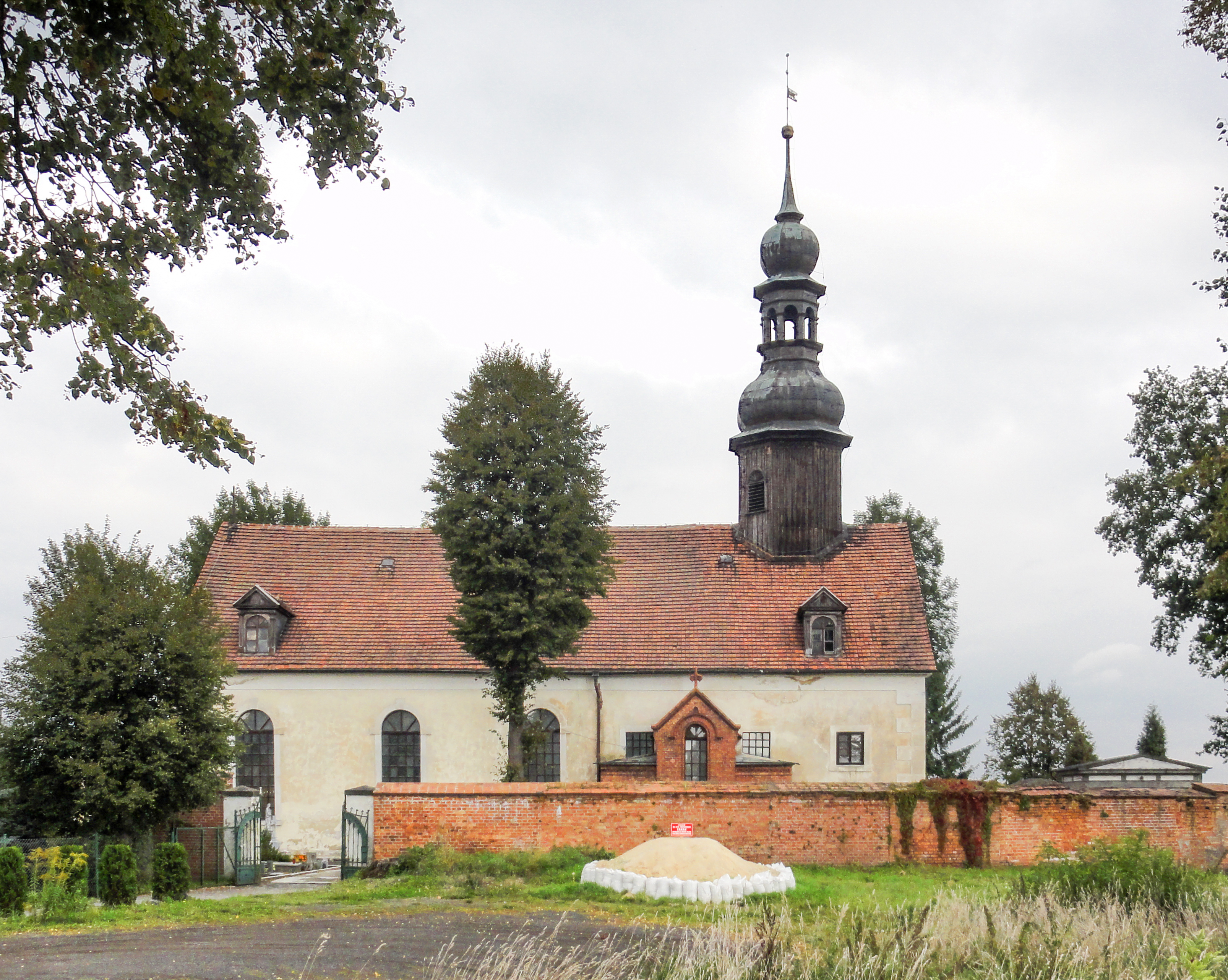 Kościelnik - kościół ewangelicki, ob. rzym.-kat. p.w. św. Jana Chrzciciela, XVIIIcmentarz ewangelicki, ob. katolicki, przy kościele, XIV, XVIII (zabytek nr rejestr. 419/864 z 19.04.1961